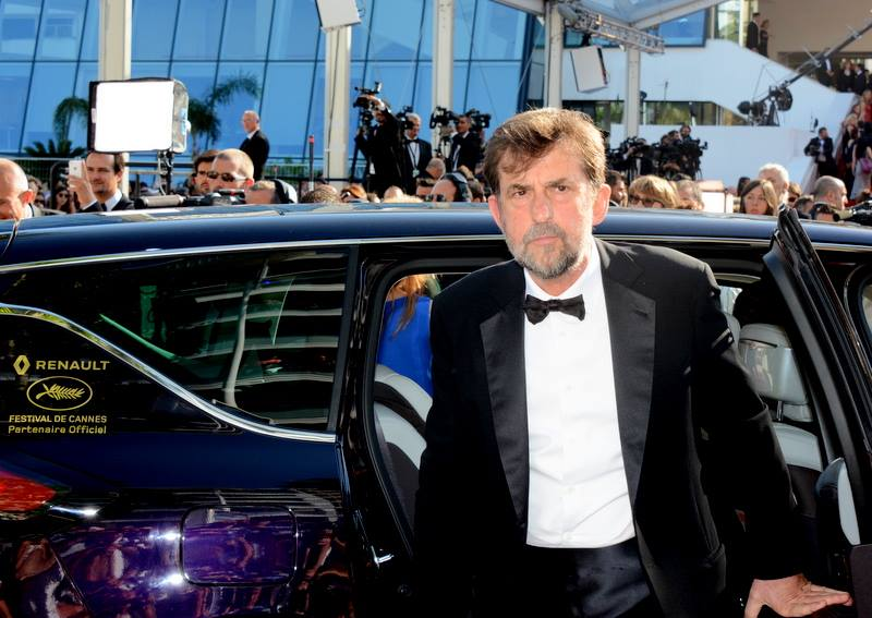 Nanni Moretti au festival de Cannes